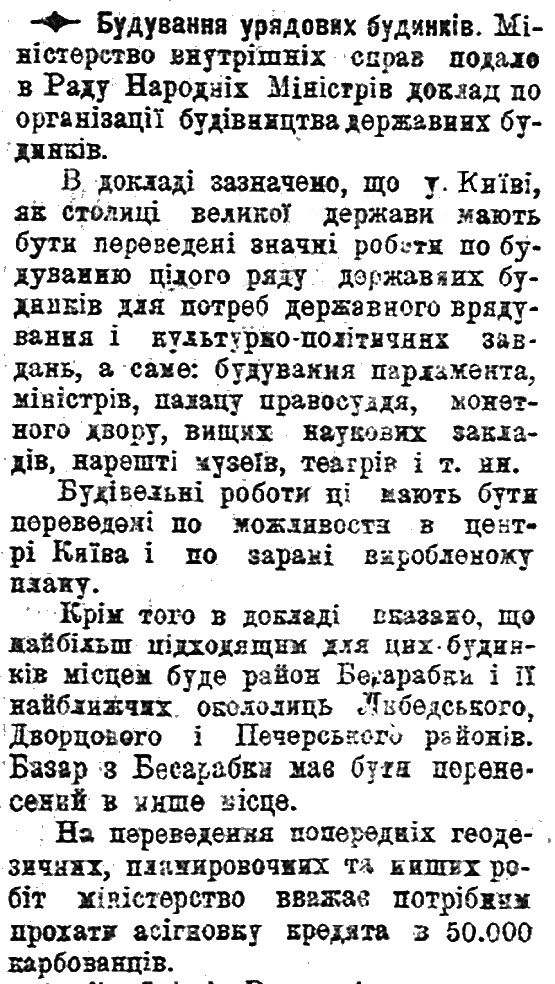 Проєкт будівництва урядового центру на Бессарабці в Києві. Повідомлення МВС УНР. "Нова Рада", 28 квітня 1918 року